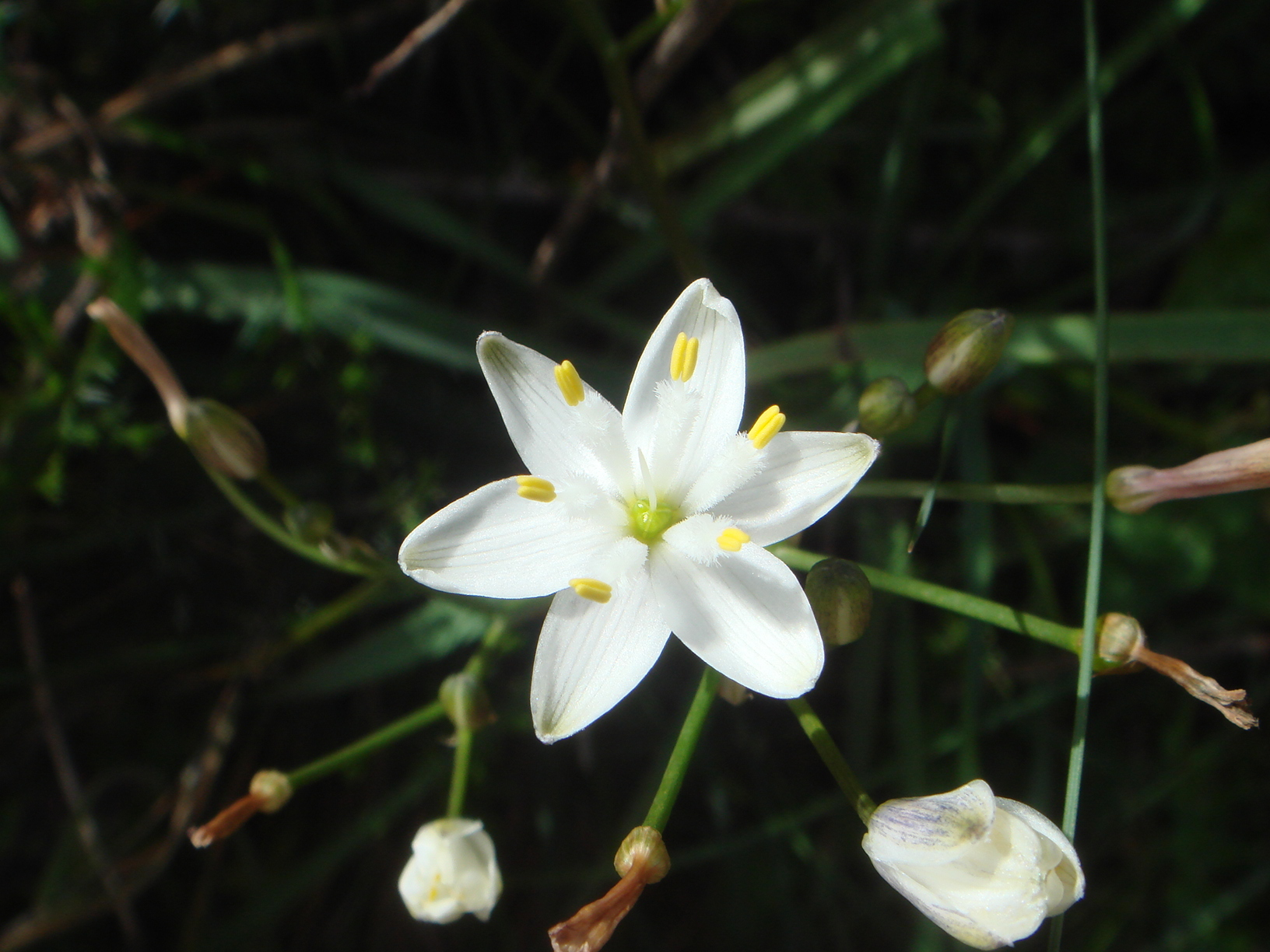 (Simethis planifolia), Ceuta, España